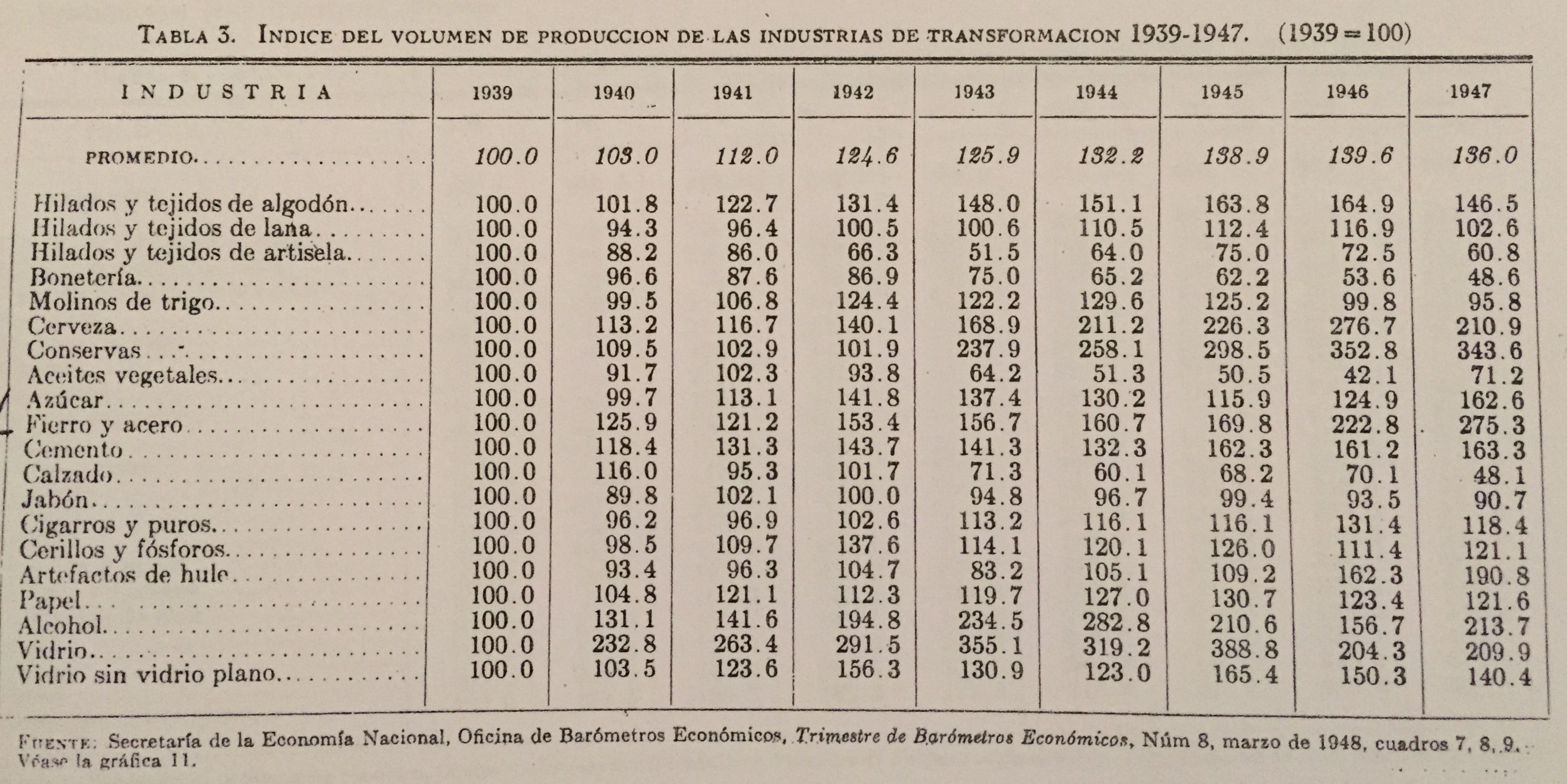 Ingreso Nacional de México 1929-1945